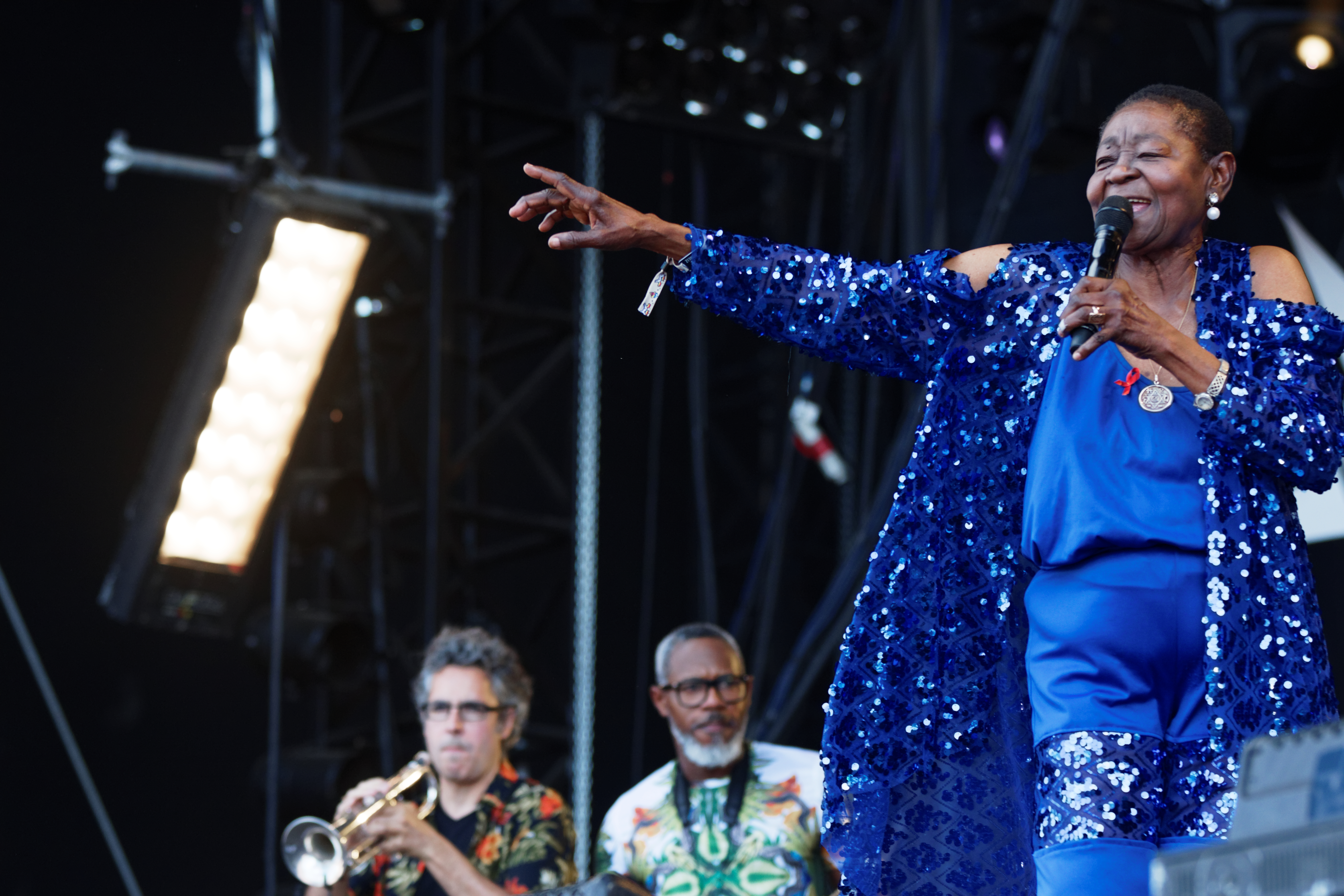 Calypso Rose en concert lors du festival des vieilles charrues 2016.